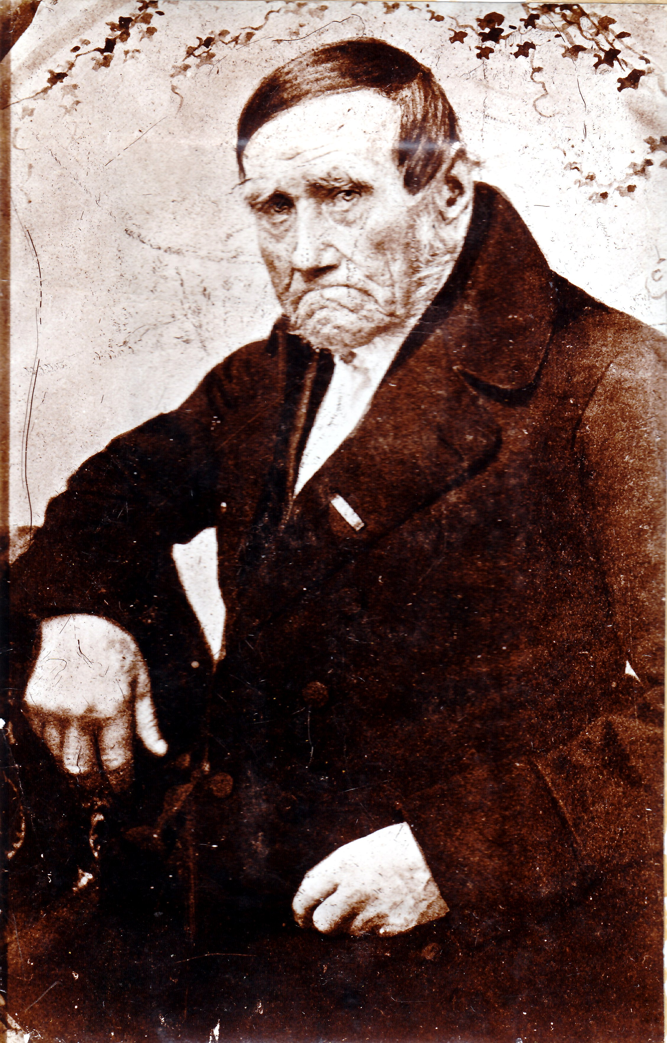 Das Bild zeigt den deutschen Elfenbeinschnitzer Lebrecht Wilhelm Schulz, aufgenommen etwa in der Zeit 1850 bis 1860.